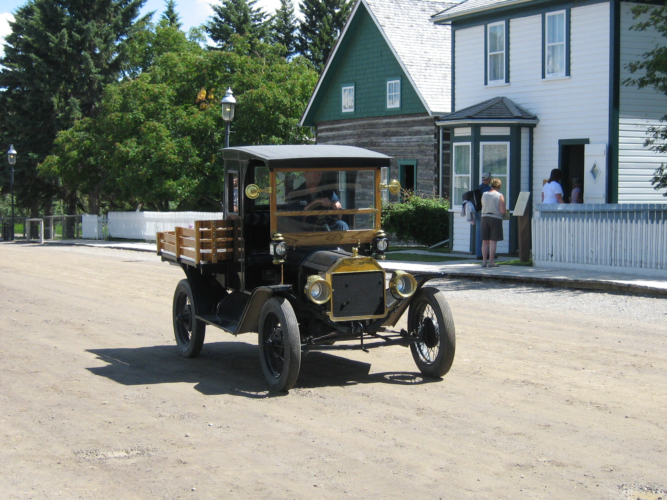 Ford Model T Truck